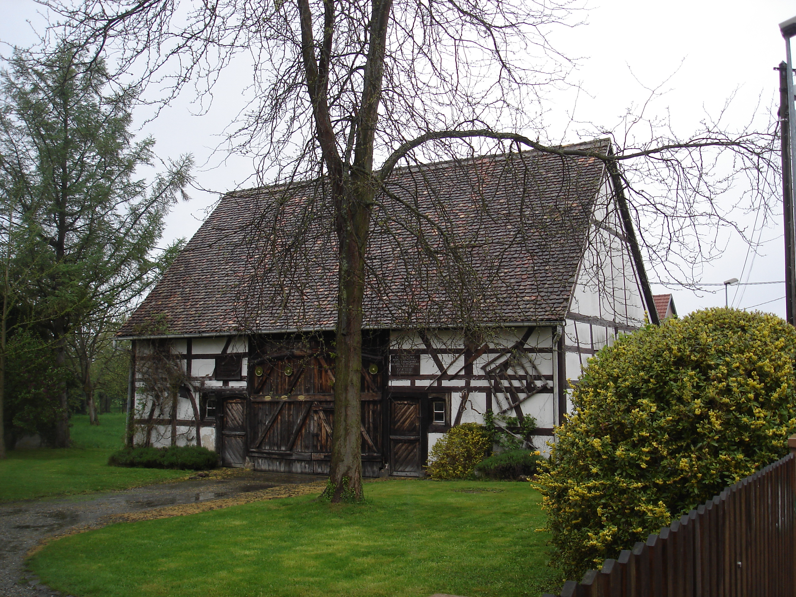 Goethescheune in Sessenheim